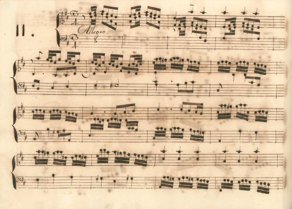 La sonate K. 358, telle qu'elle se présente dans le manuscrit de Parme, volume X no. 11.